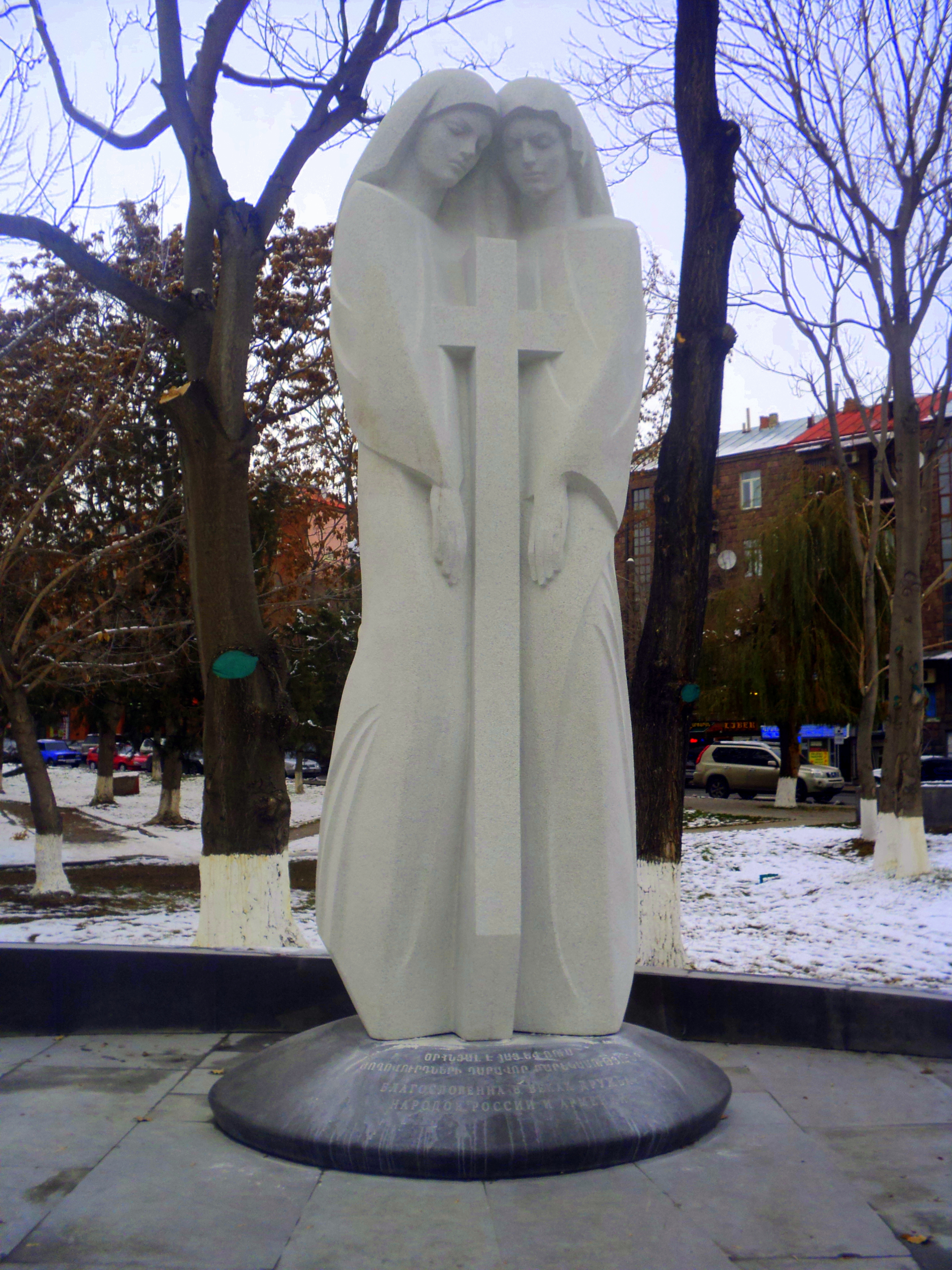 Քանդակագործ` Ֆրիդ Սողոյան